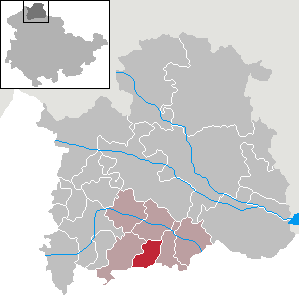 Gemeinde Hainrode in Thüringen, Landkreis Nordhausen